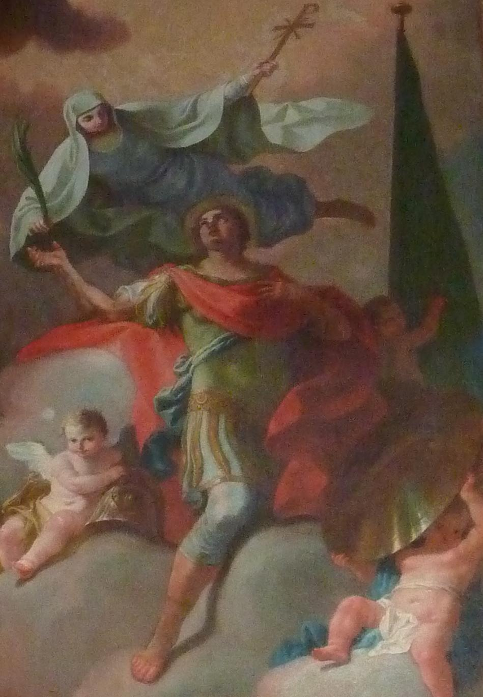 Dom von St. Pölten, Niederösterreich - Hippolyt-Altar mit Gemälde Glorie des hl. Hippolyt (Daniel Gran, 1746)